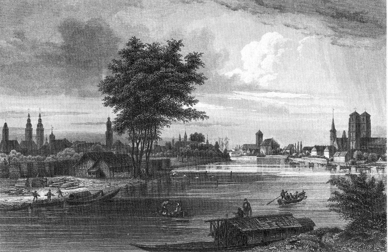 Historische Ansicht von Breslau in Schlesien (heute Wroclaw in Polen). Stahlstich.